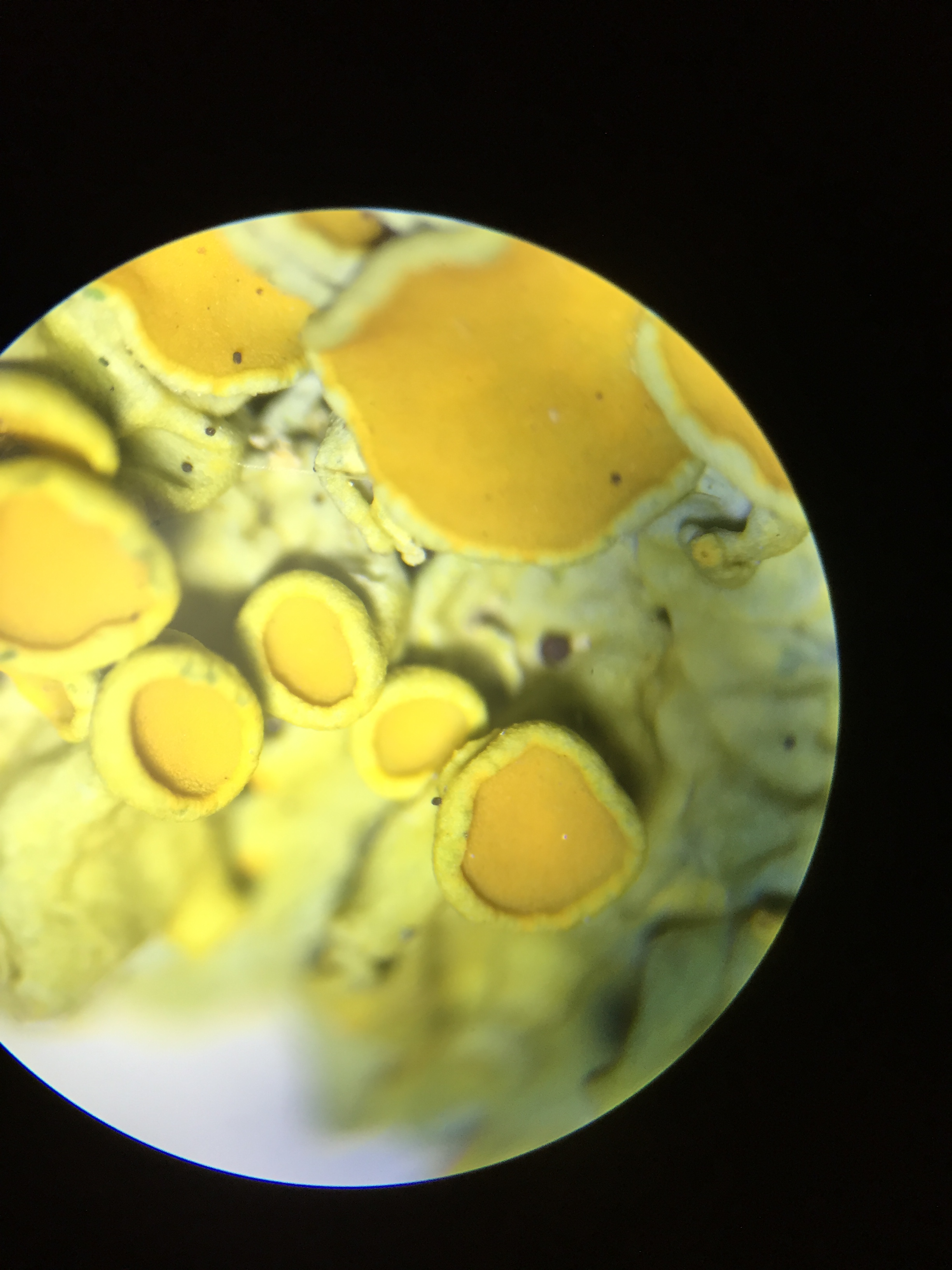 4 násobné zvětšení pod binokulárem